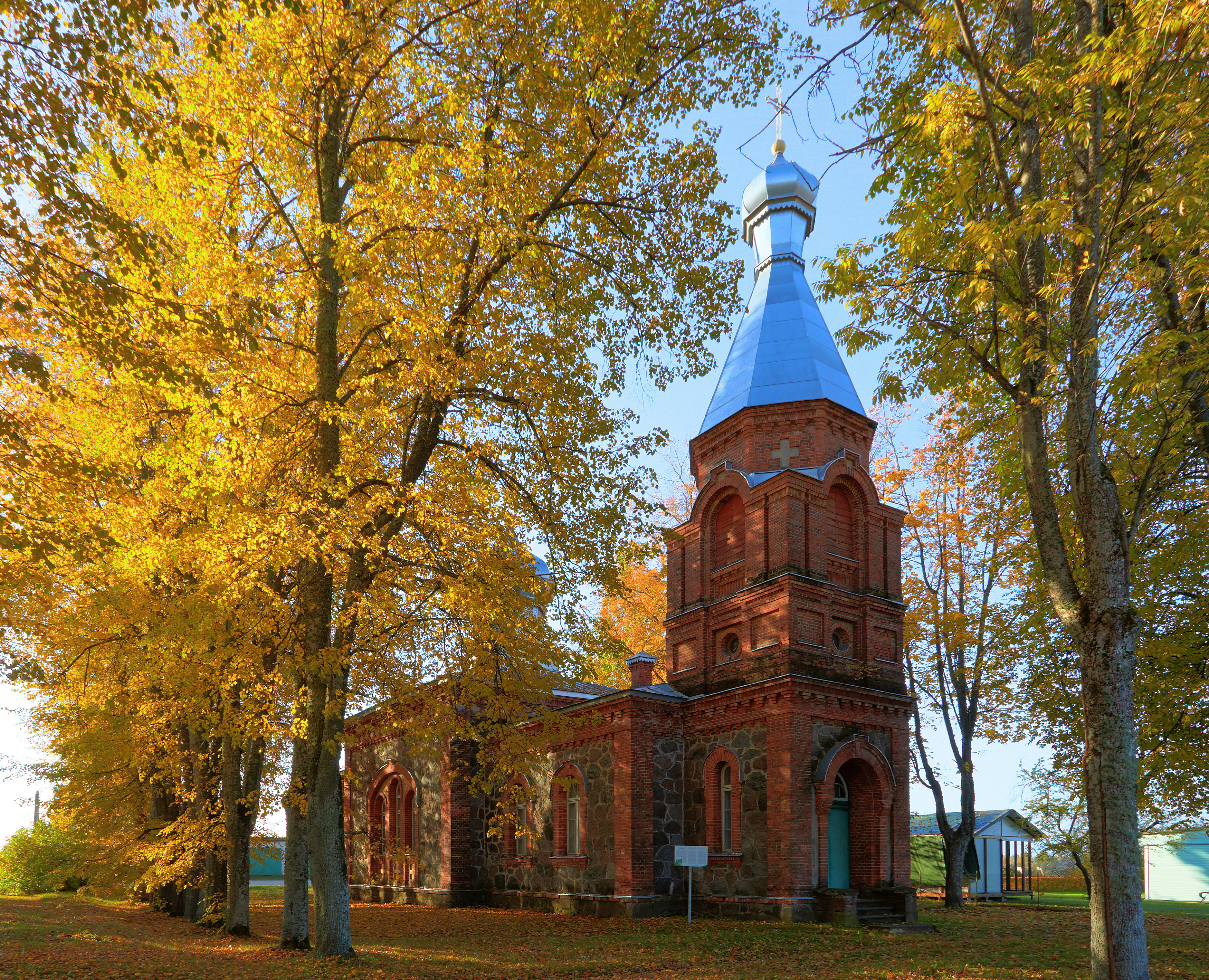 Kraavi kirik 2014. aastal